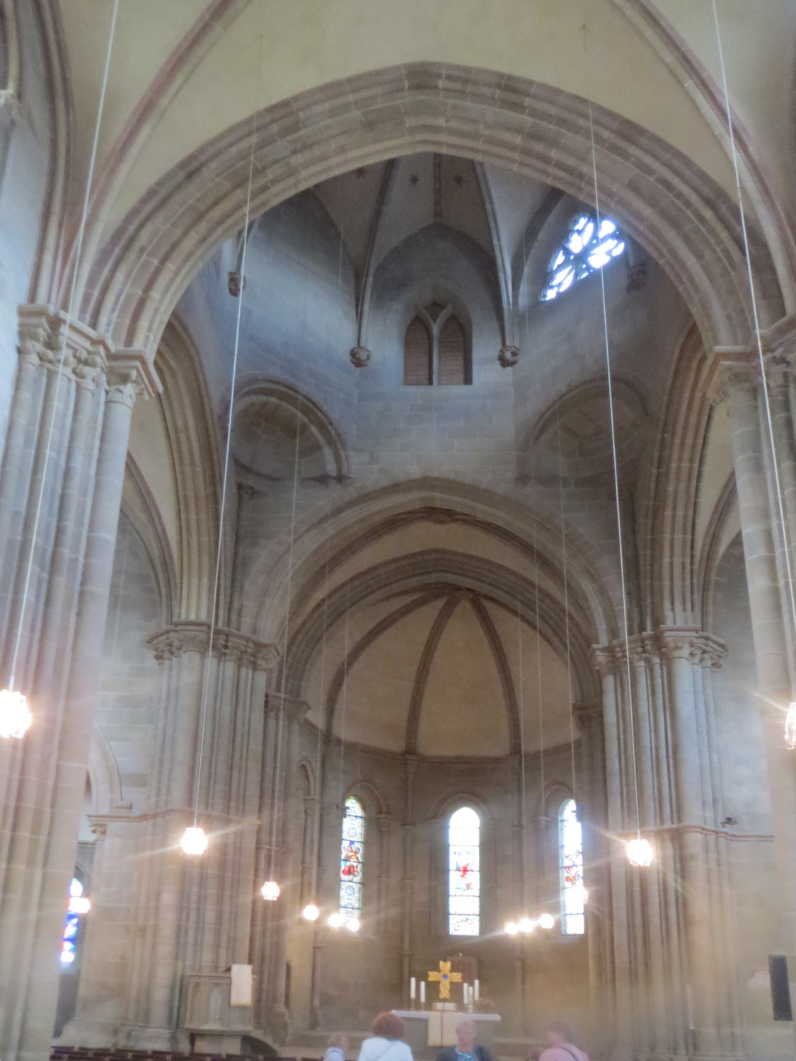 Inneres der Protestantische Kirche in Offenbach am Glan